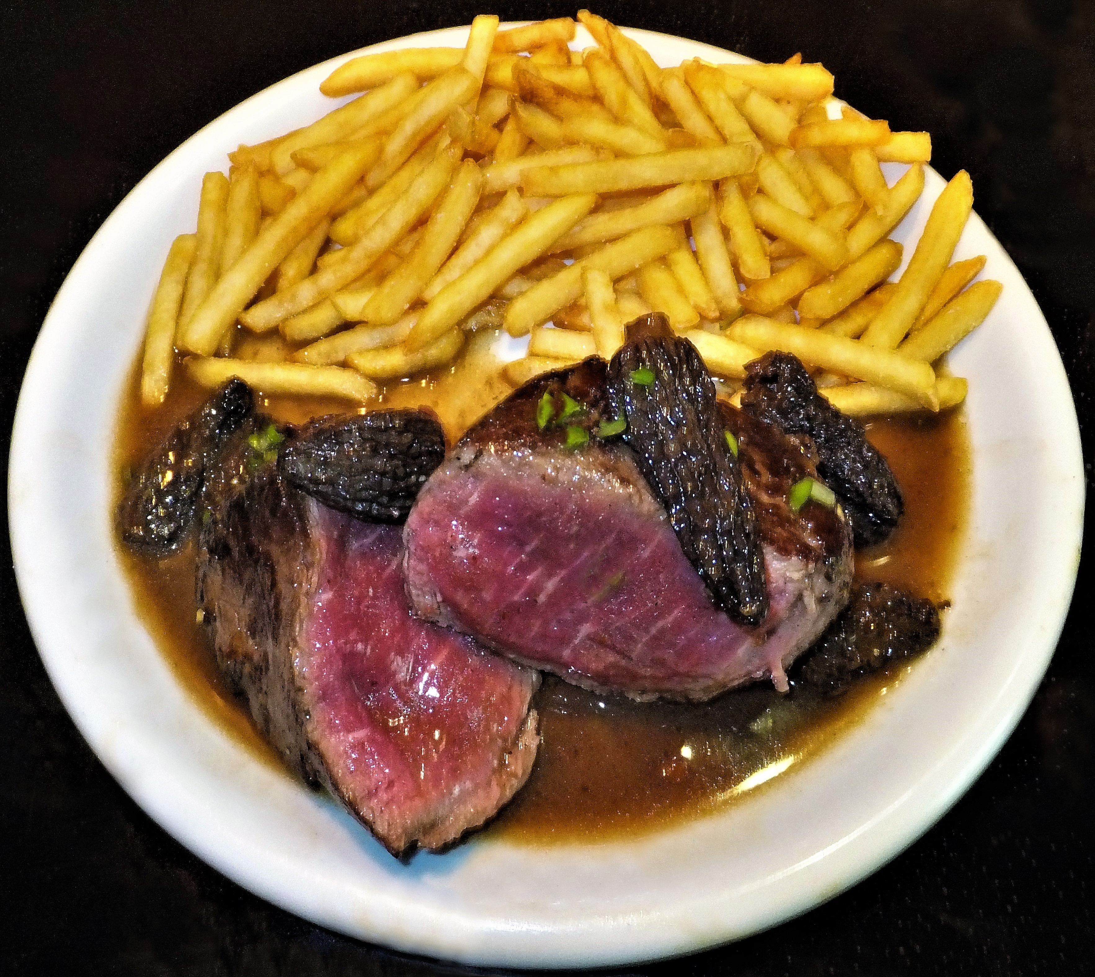 Variation vom Chateaubriand bleu an mit Butter montierter Spitzmorchel-Cognac-Sauce